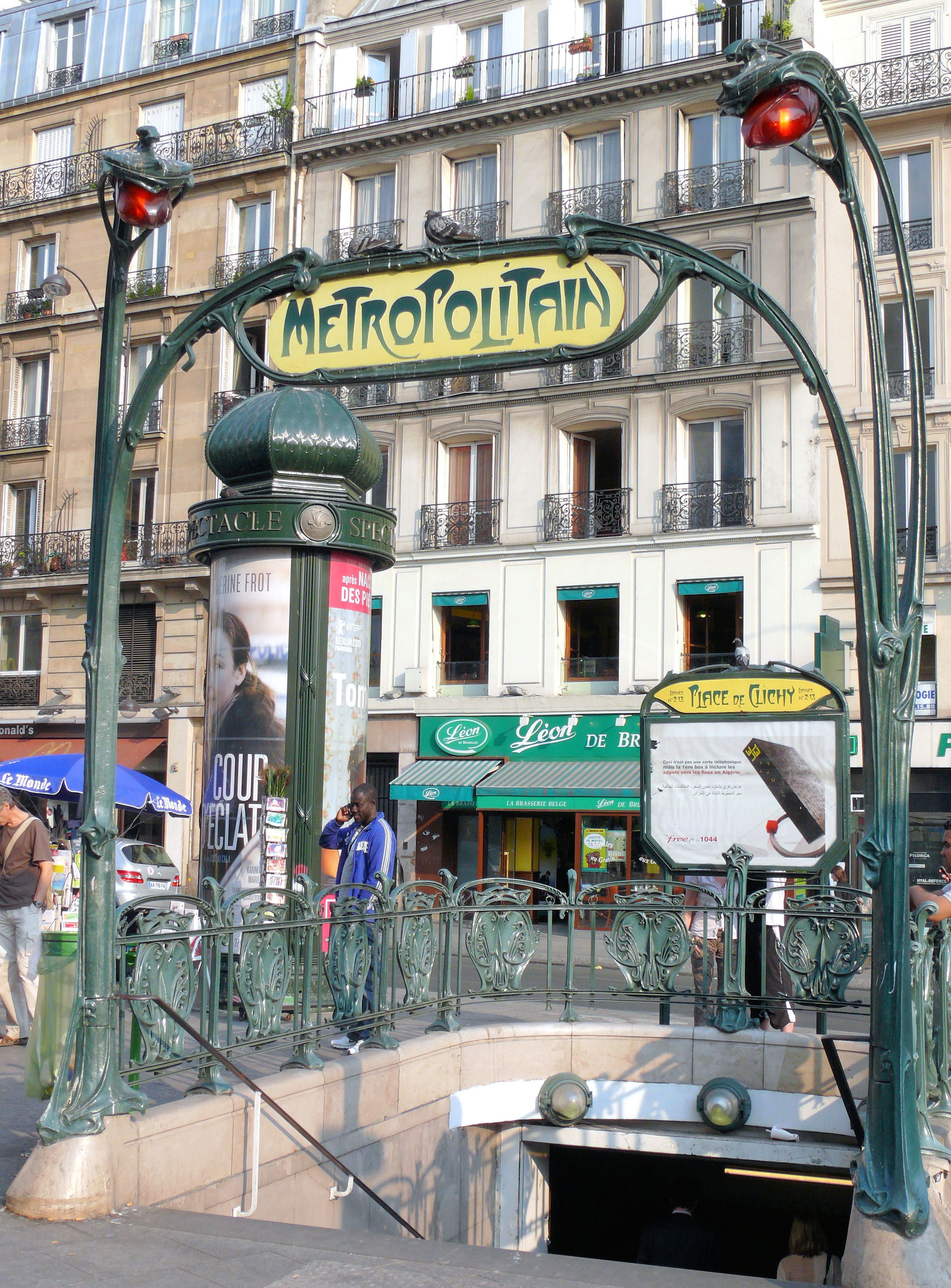 Paris 18ème arrondissement - Edicule Guimard place de Clicy